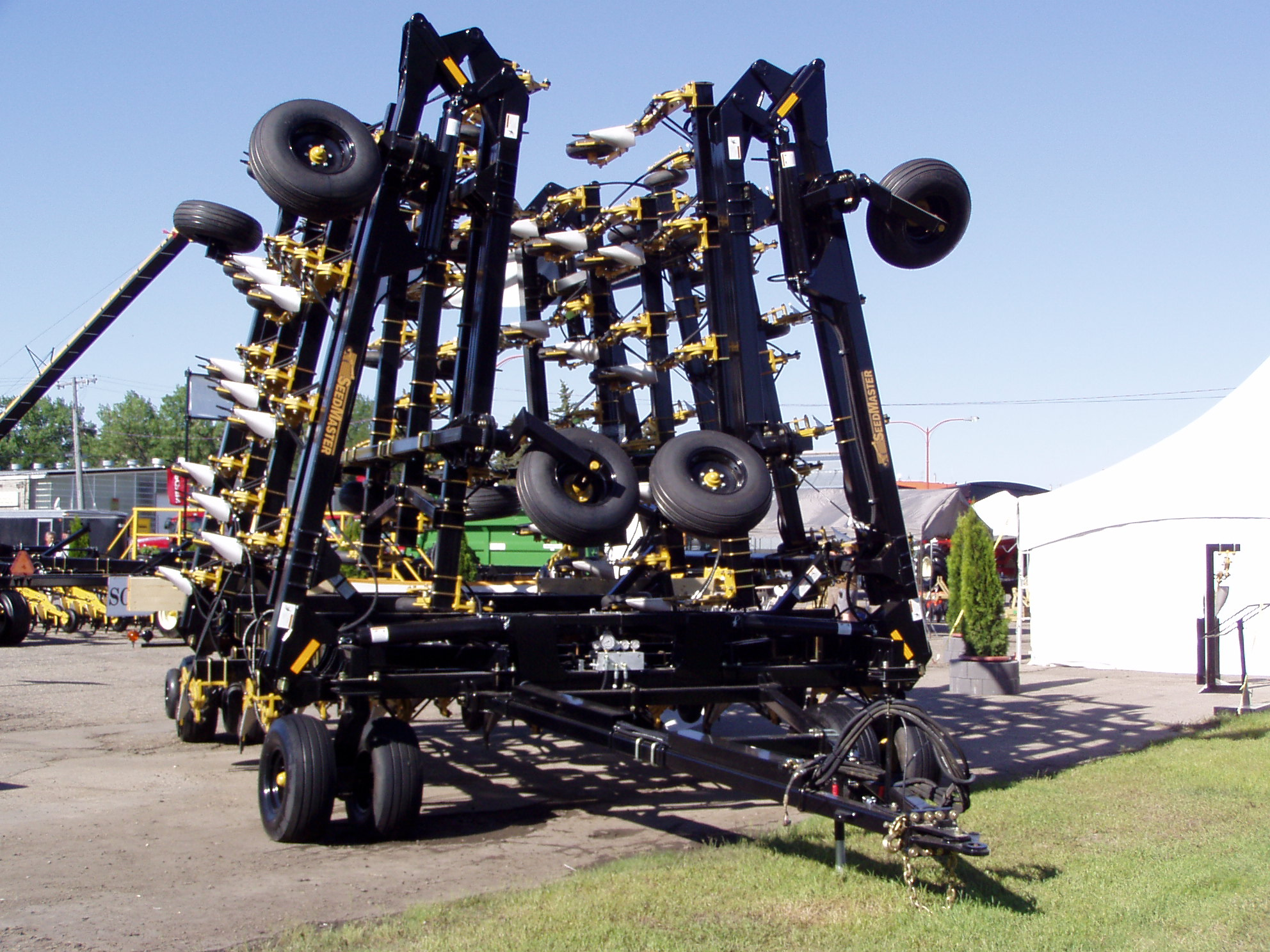 Eine Seedmaster-Sämaschine während einer Show in Kanada